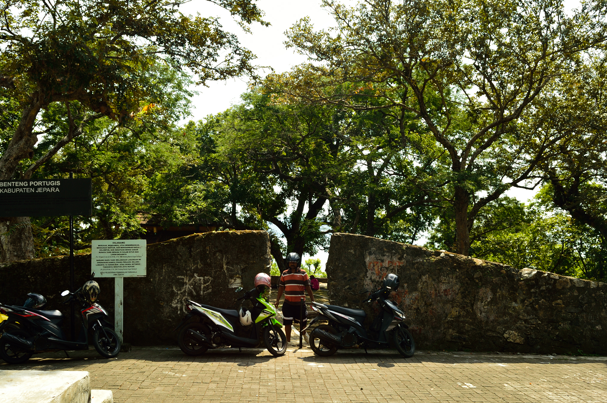 Entrée du Benteng Portugis ("fort portugais") à Jepara, Java central, Indonésie